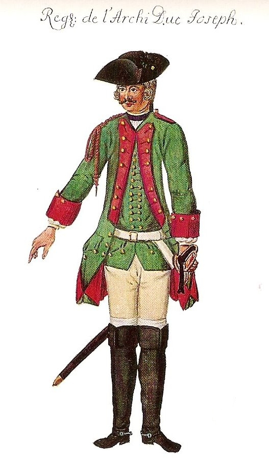 Kaiserliches Dragonerregiment Erzherzog Joseph 1762 (D I)